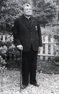 アントニオ・カヴォリ神父, отец Антонио Каволи (SDB), Antonio Cavoli